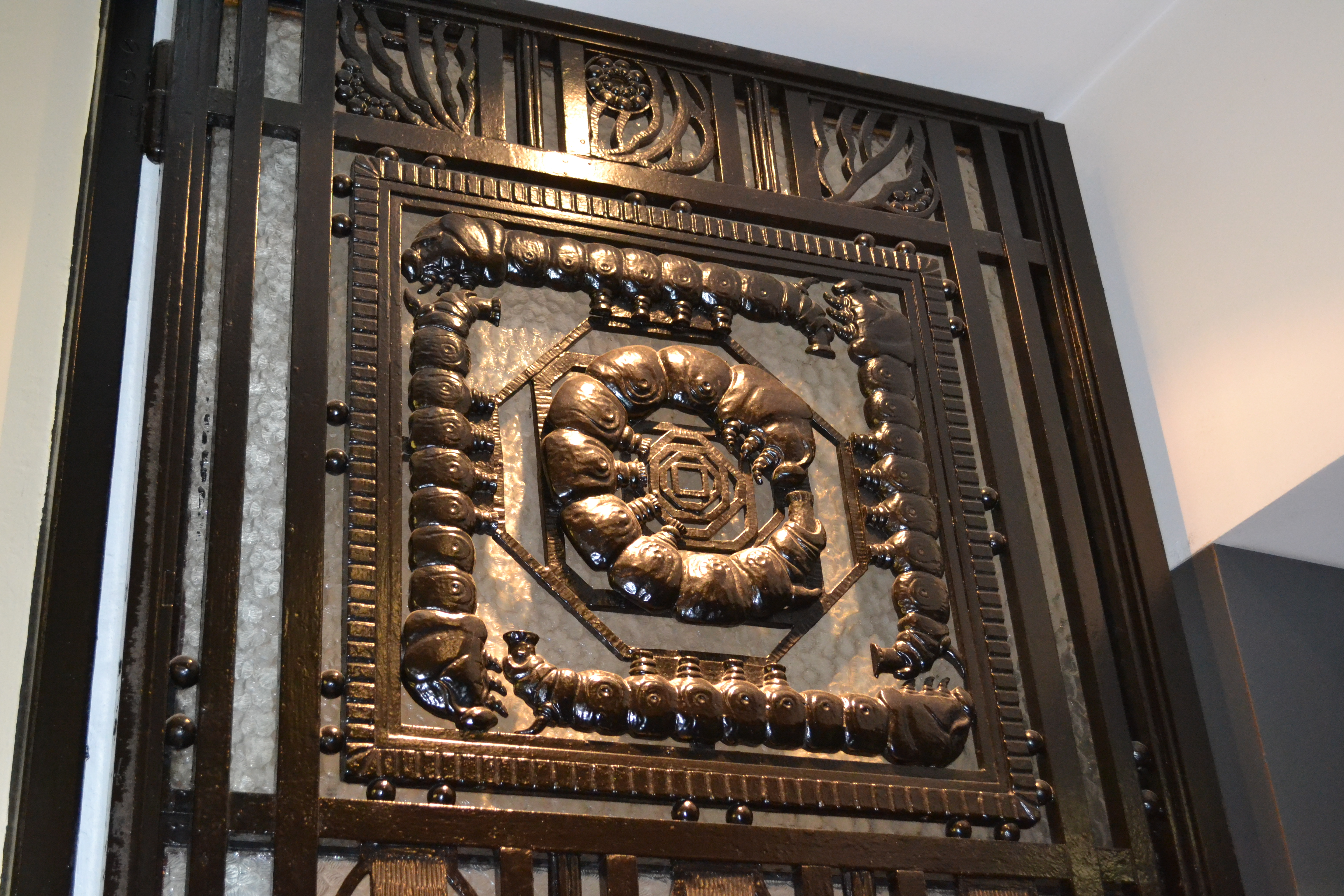 Porte réalisée par Charles Piguet pour l'exposition universelle de 1925. Détail du panneau supérieur droit avec vers à soie.